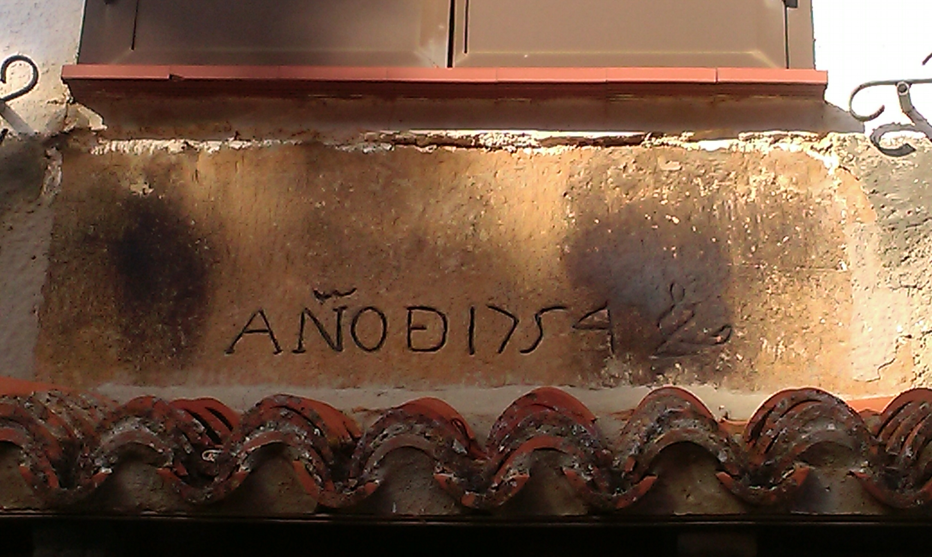 Detalle canalejas carcel